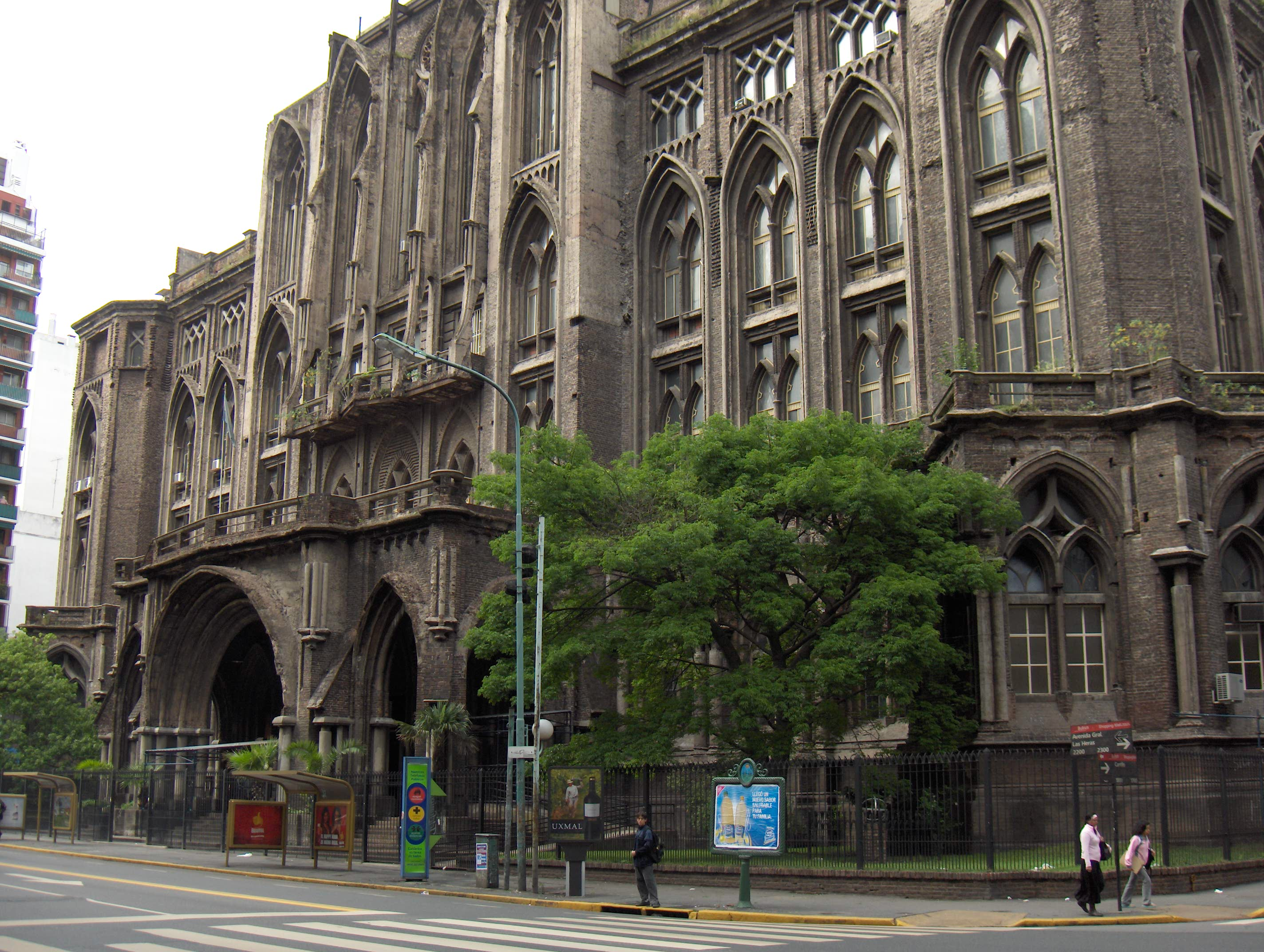 Sede Las Heras de la Facultad de Ingeniería de la Universidad de Buenos Aires.